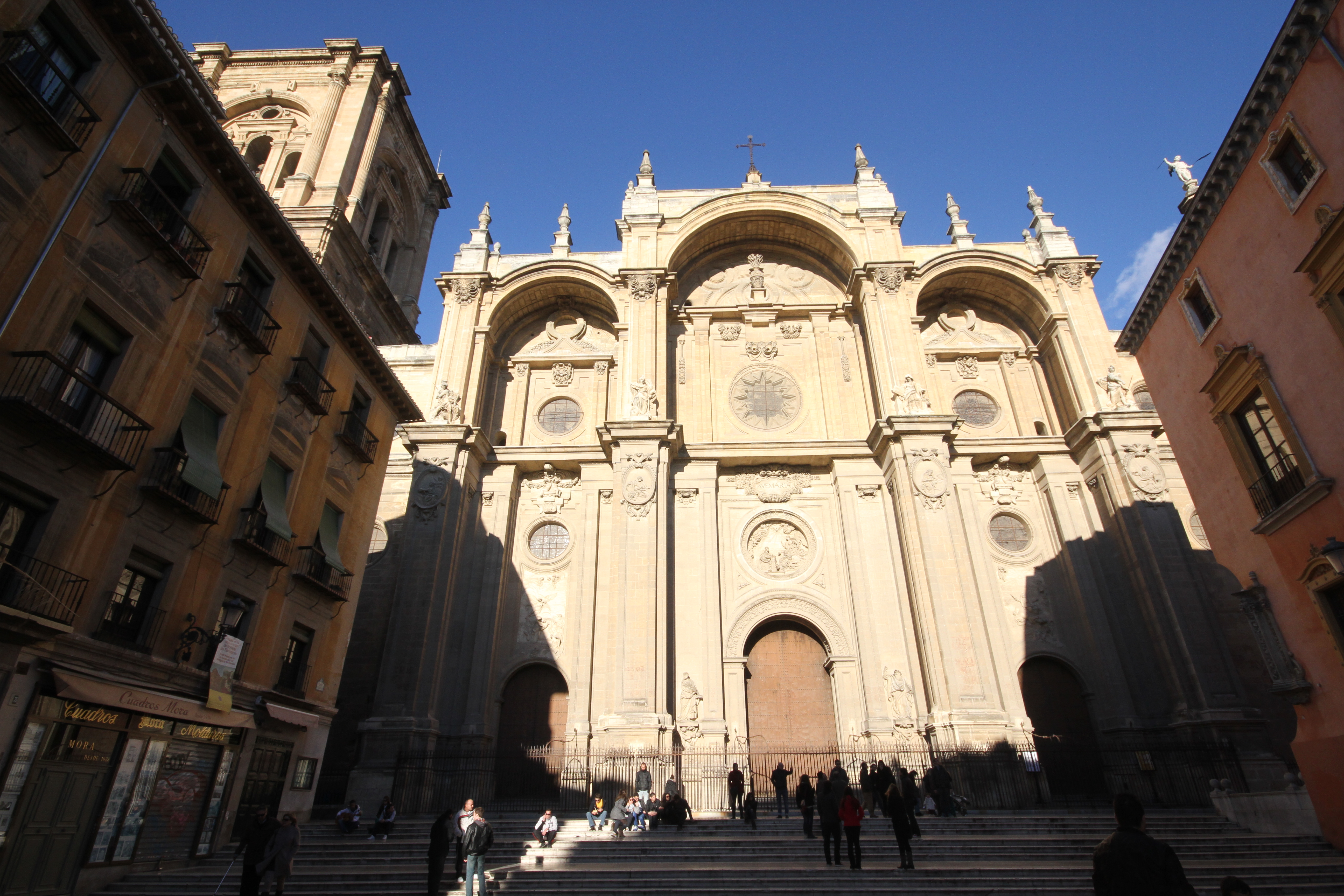 Exterior da Catedral de Granada